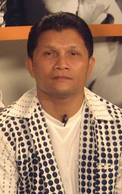 Khaosai Galaxy at MTV